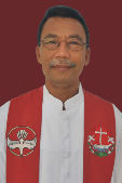 Pdt. Gst. Putu Rainadi